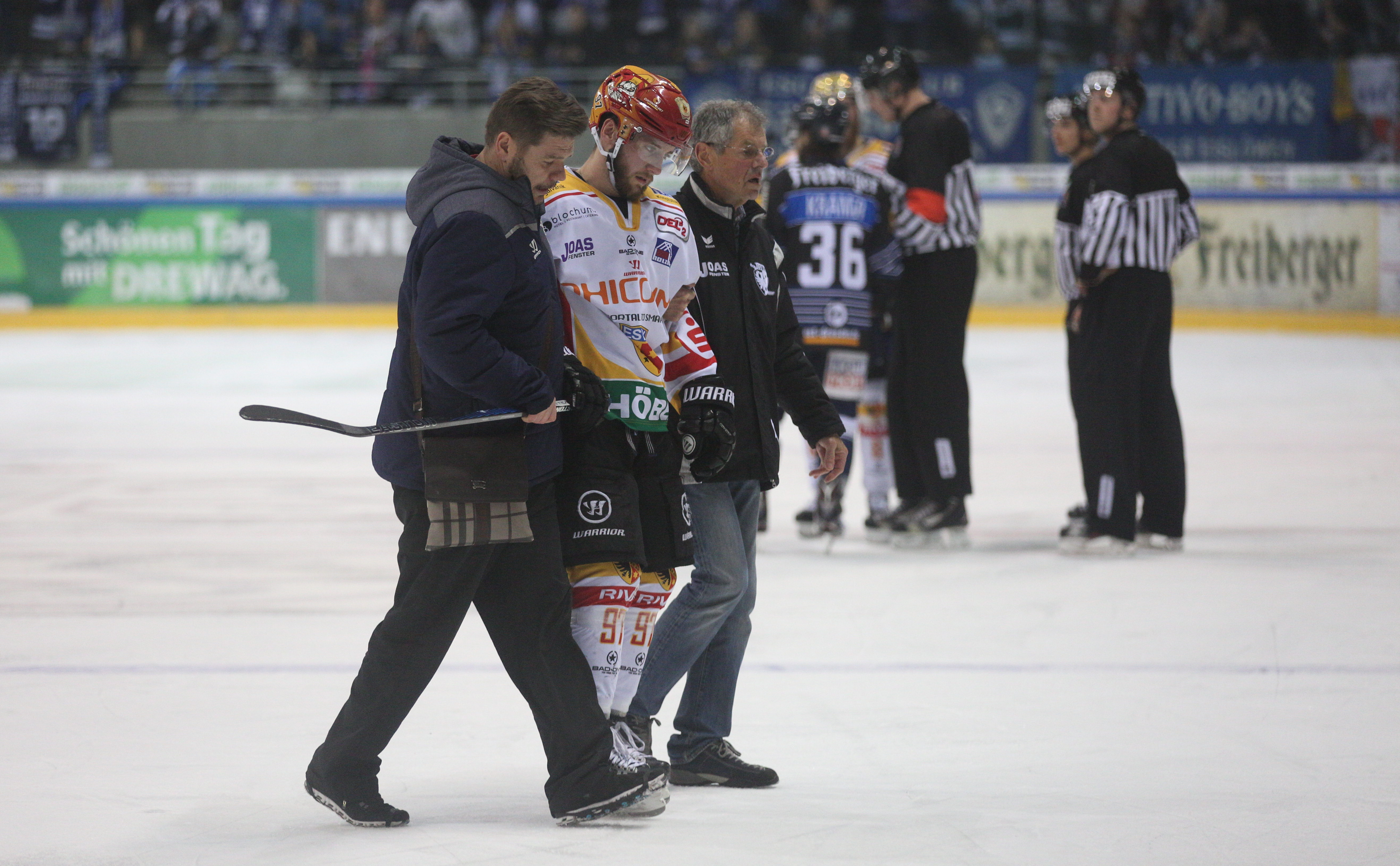 DEL 2 Play-off-Spiel Dresdner Eislöwen gegen ESV Kaufbeuren (1:4) am 14. März 2017 in der EnergieVerbund-Arena, Dresden